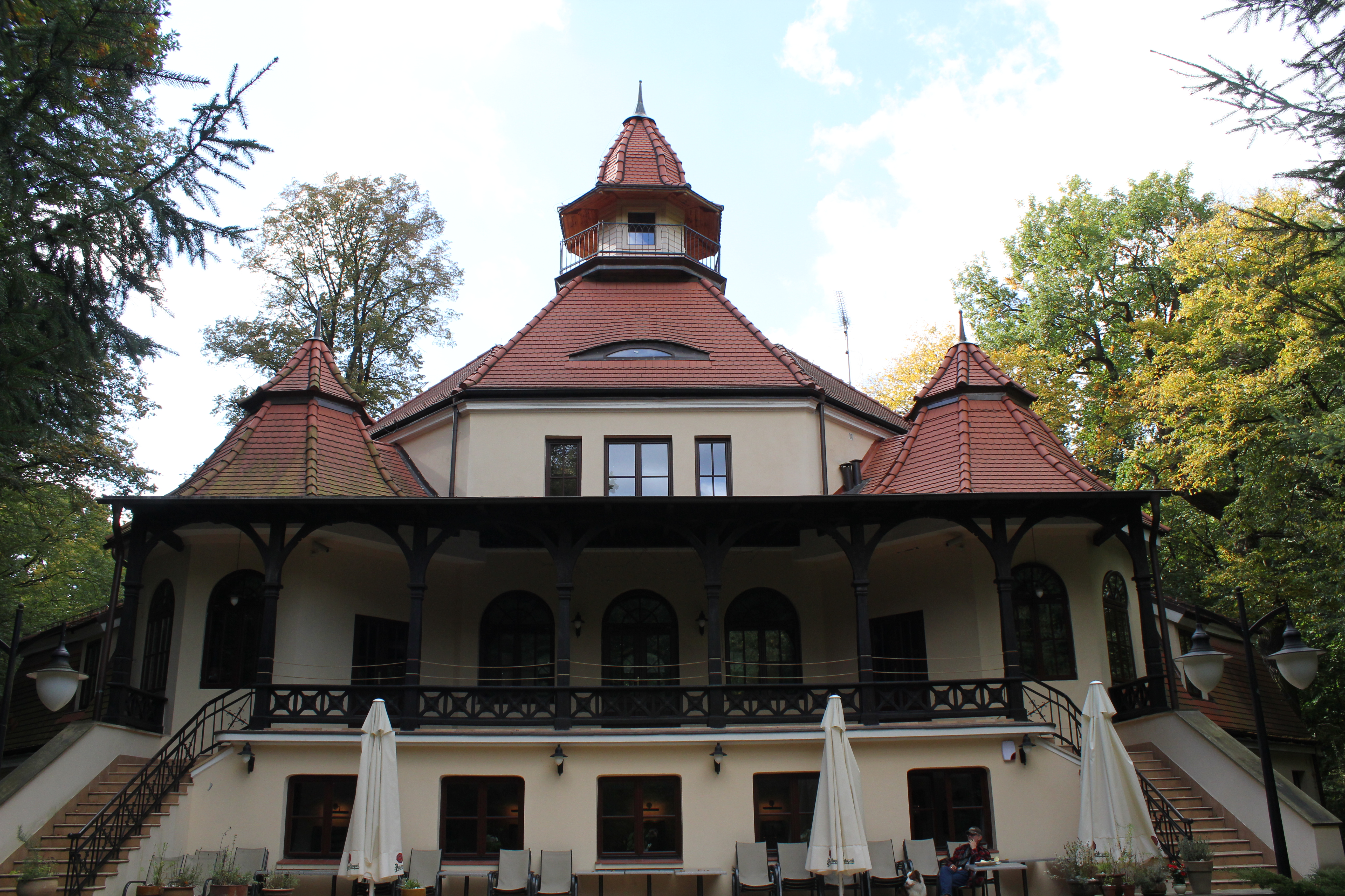 Podkowa Leśna, ul. Lilpopa 16 - dawne kasyno, mur.-drewn., ogród 1925 (zabytek nr 1182-A z 29.06.1981)